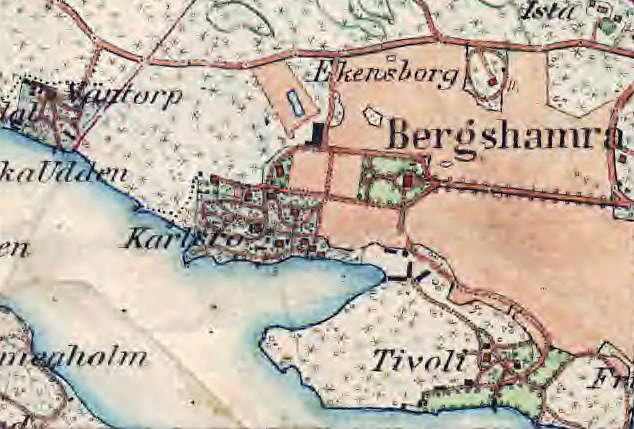 Bergshamra, Karlsro, Tivoli på Häradsekonomiska kartan